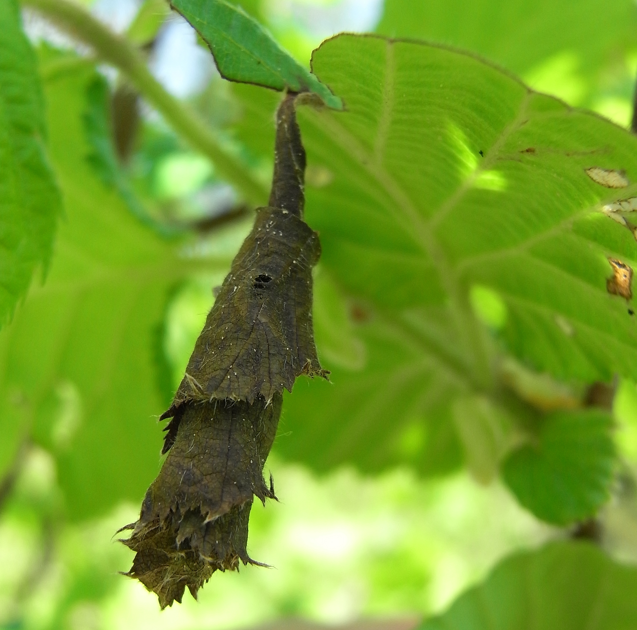 Von Deporaus betulae gerolltes Blatt Ricoh R8